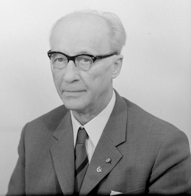 Johannes Dieckmann ADN-Zentralbild/Hochneder 11.7.1967 Prof. Dr. Johannes Dieckmann Stellvertretender Vorsitzender des Staatsrates der DDR, Präsident der Volkskammer der DDR, stellvertretender Vorsitzender der LDPD. [Porträt Johannes Dieckmann] Abgebildete Personen: Dieckmann, Johannes: Präsident der Volkskammer der DDR, DDR (GND 118678248)